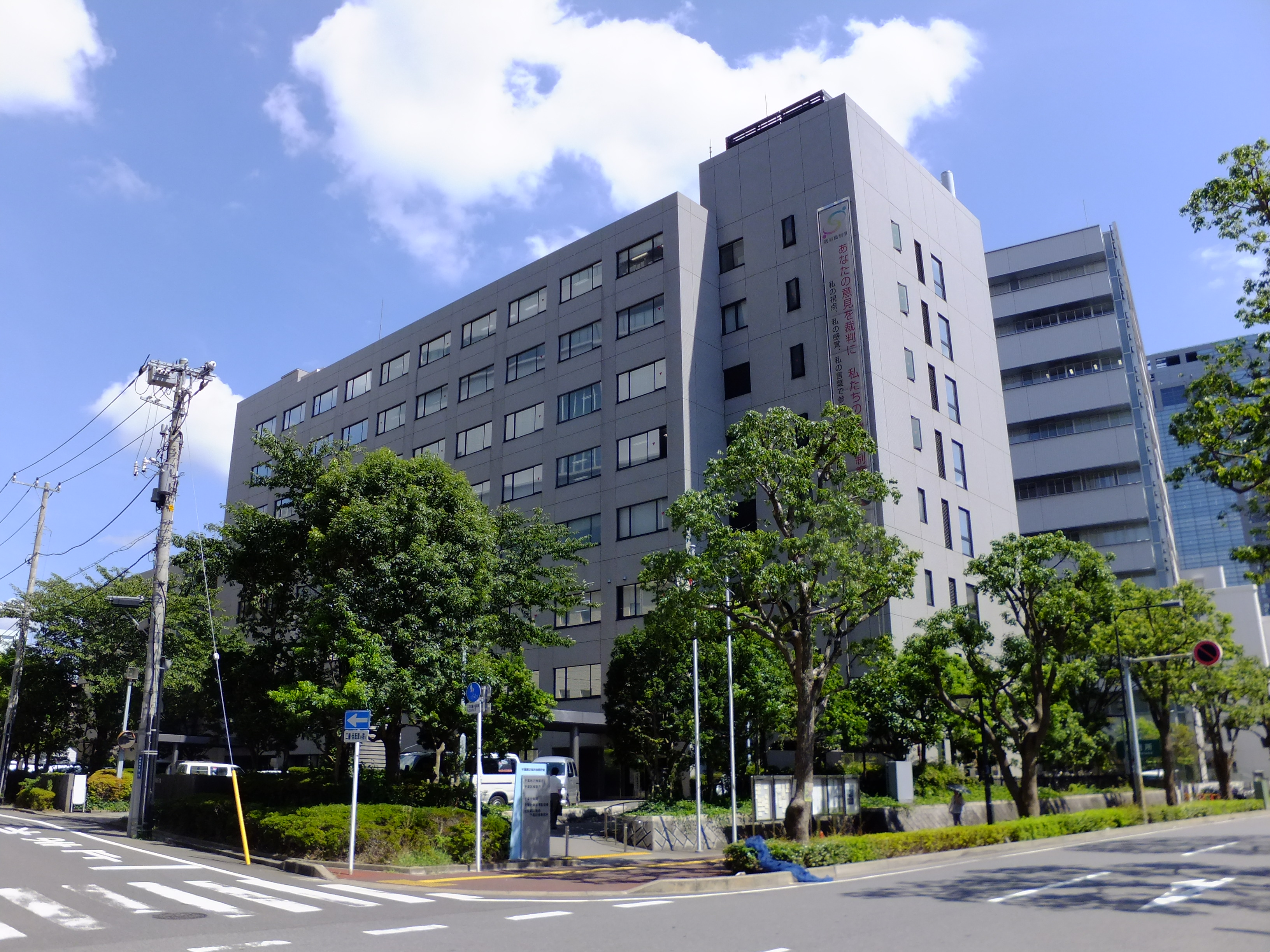 千葉第二地方合同庁舎。千葉地方検察庁、千葉区検察庁、千葉労働局、千葉労働基準監督署、北関東防衛局千葉防衛事務所が入居。千葉地方裁判所に隣接する。